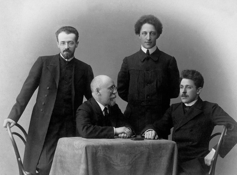 Писатели Константин Эрберг (Сюннерберг), Федор Сологуб, Александр Блок, Георгий Чулков Дата съемки: апрель - декабрь 1908